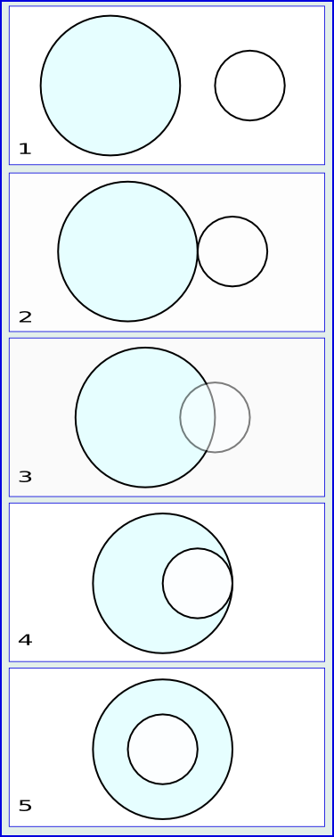 posições relativas